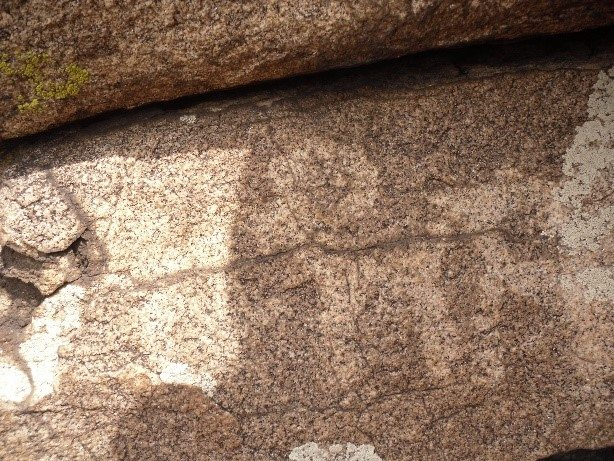 Қазақша (кирил): Ақ бауыр тарихи археологиялық кешеніндегі тас бетіндегі суреттер